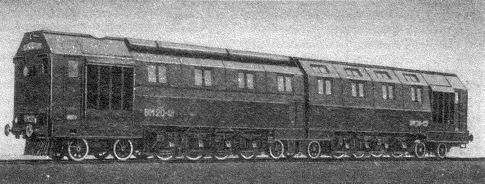 Двухсекционный тепловоз ВМ